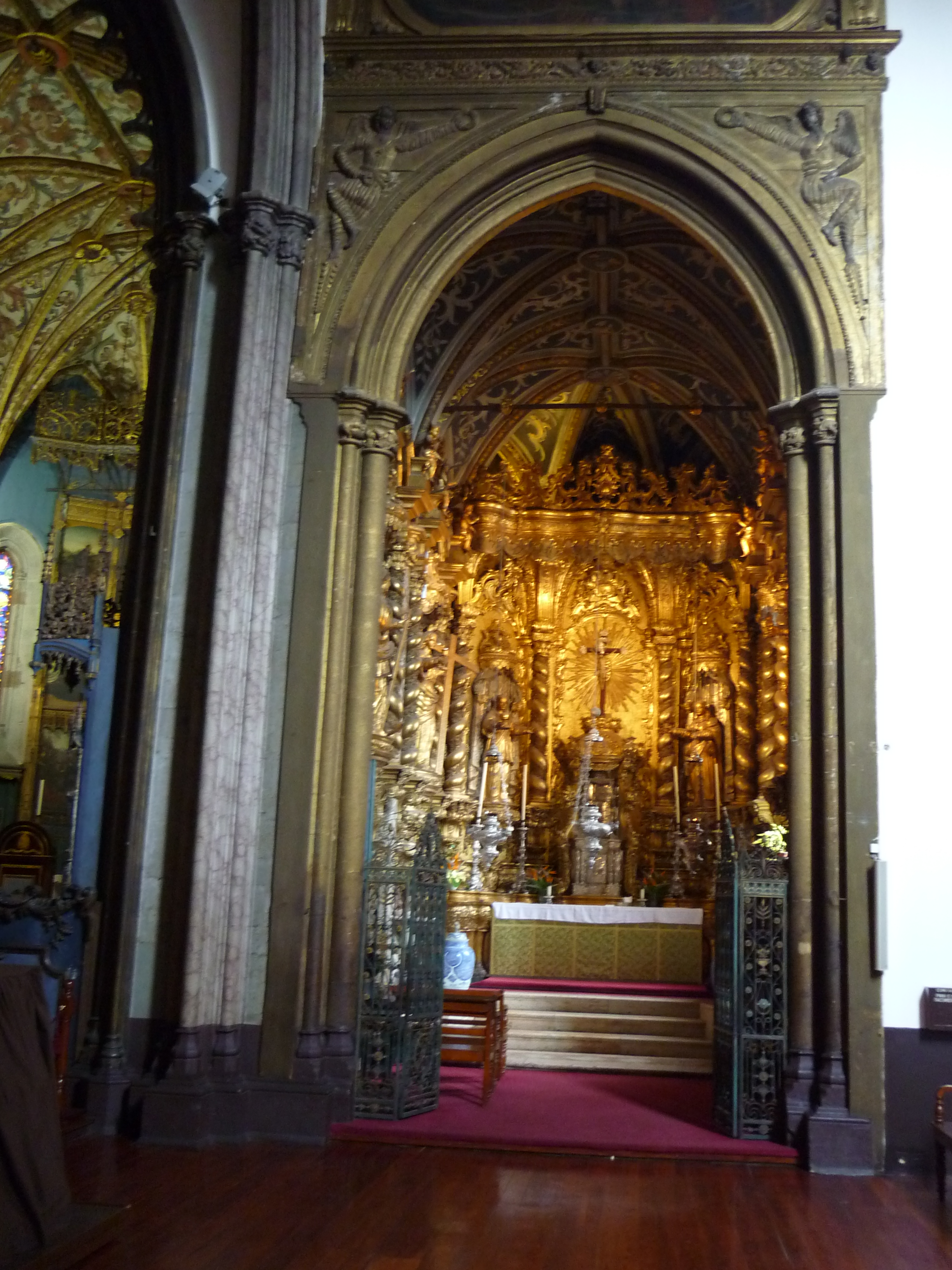 A Szentlélek kápolnája a funchali (Madeira) székesegyházban (16. század eleje – 18. század közepe)